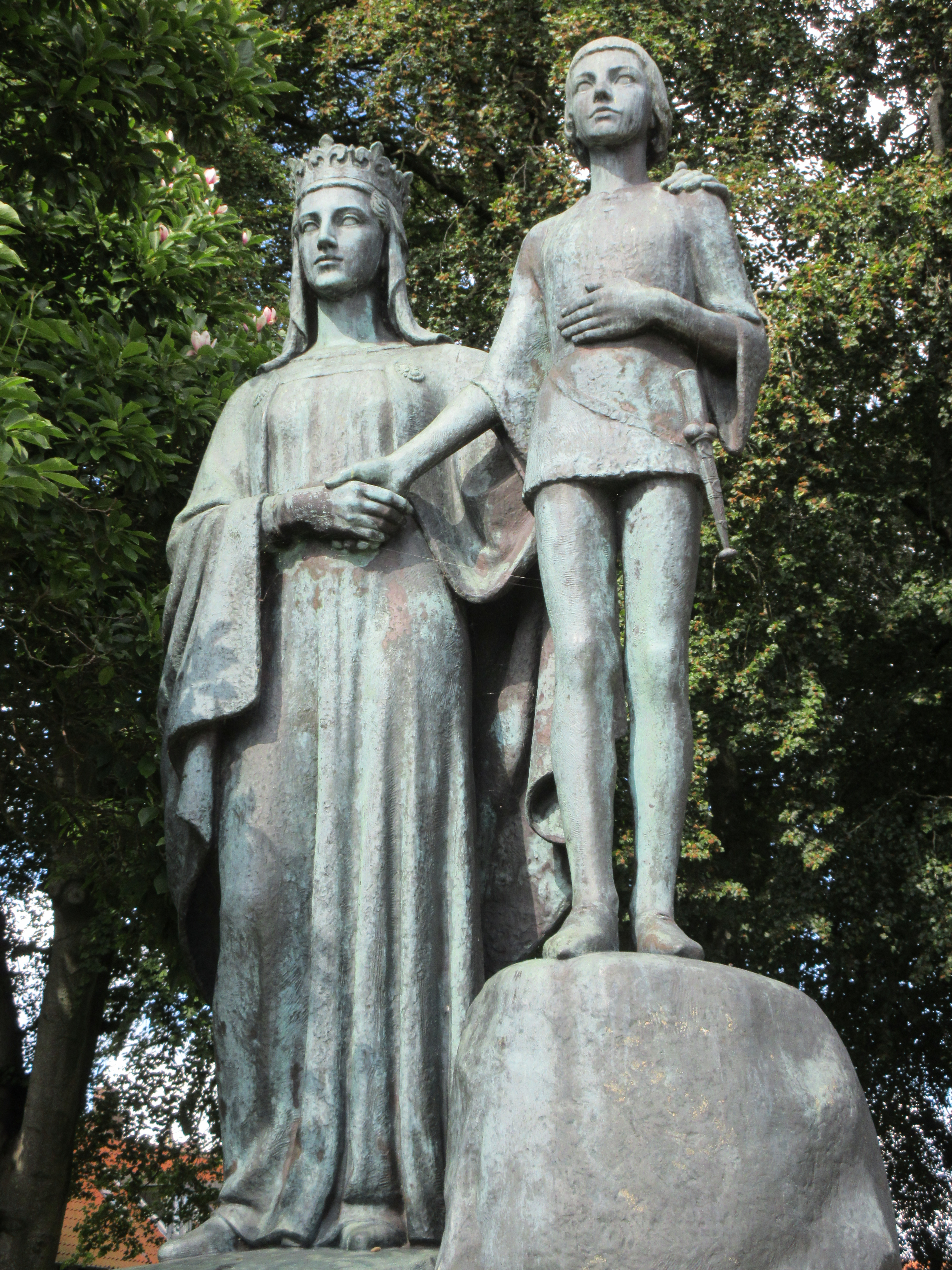 Kongehyldningsmonumentet i Viborg i bronce og granit, dronning Margrete og kong Erik (af Pommern) ved dennes hyldning som konge i 1396. Monumentet udført af Axel Poulsen 1961-65.